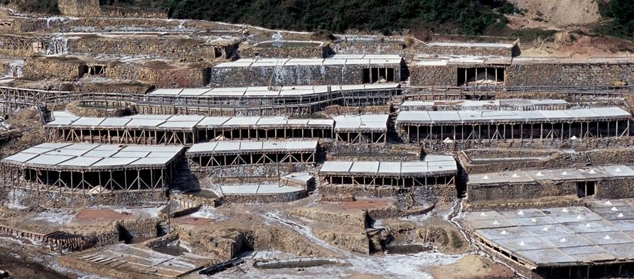 Fotografía general de una zona restaurada